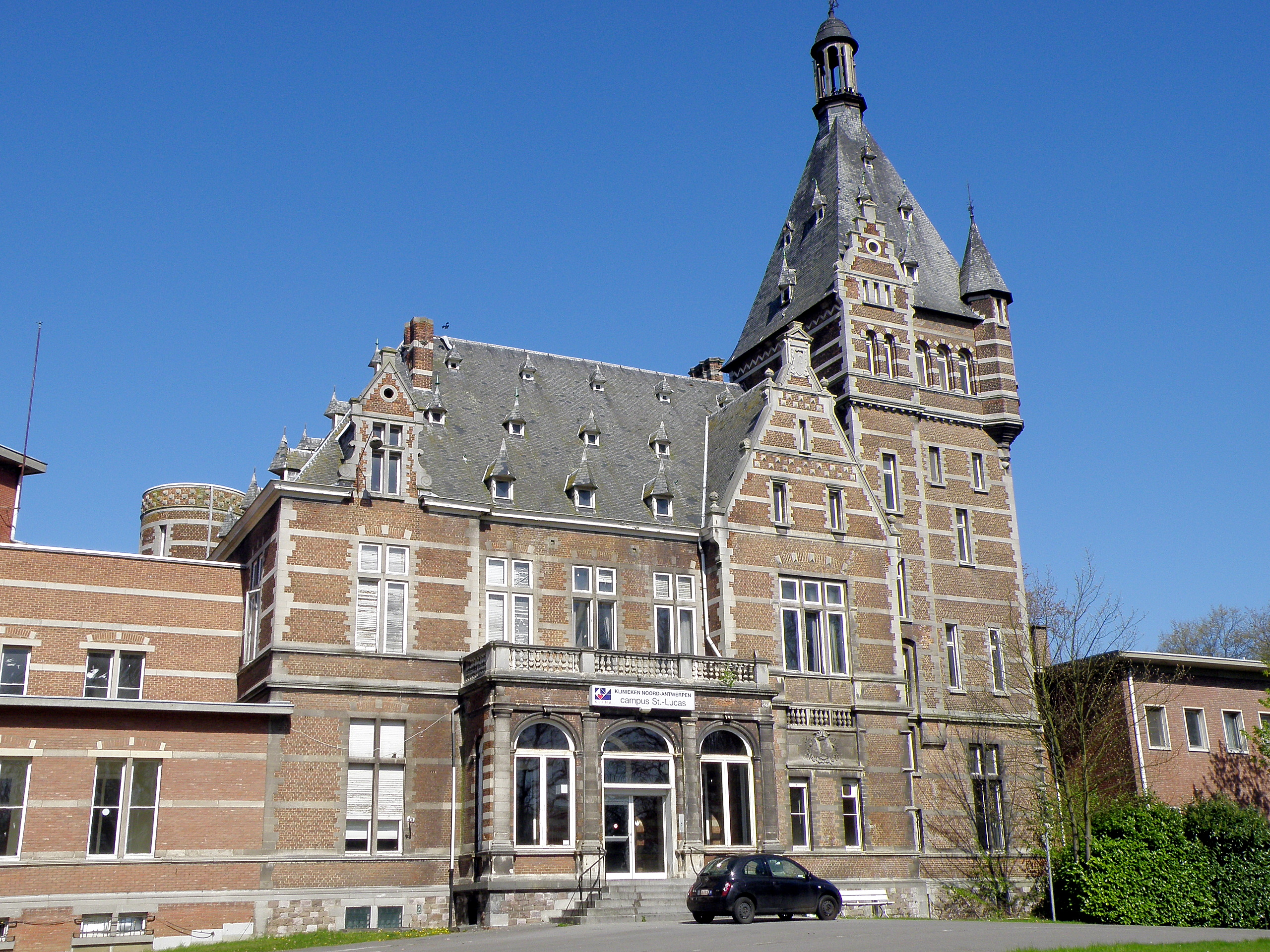 Antwerpen, district Ekeren. Voormalige Sint-Lucaskliniek, voorheen Hof van Delft, bouwjaar 1903, n.o.v. Henri en Leonard Blomme, in neo-Vlaamse renaissancestijl. Voorgevel (= Z.-O. gevel). Wordt waarschijnlijk gesloopt zomer 2010, wegens te hoge renovatiekosten. Vgl. verder Inventaris Bouwkundig Erfgoed Vlaanderen.